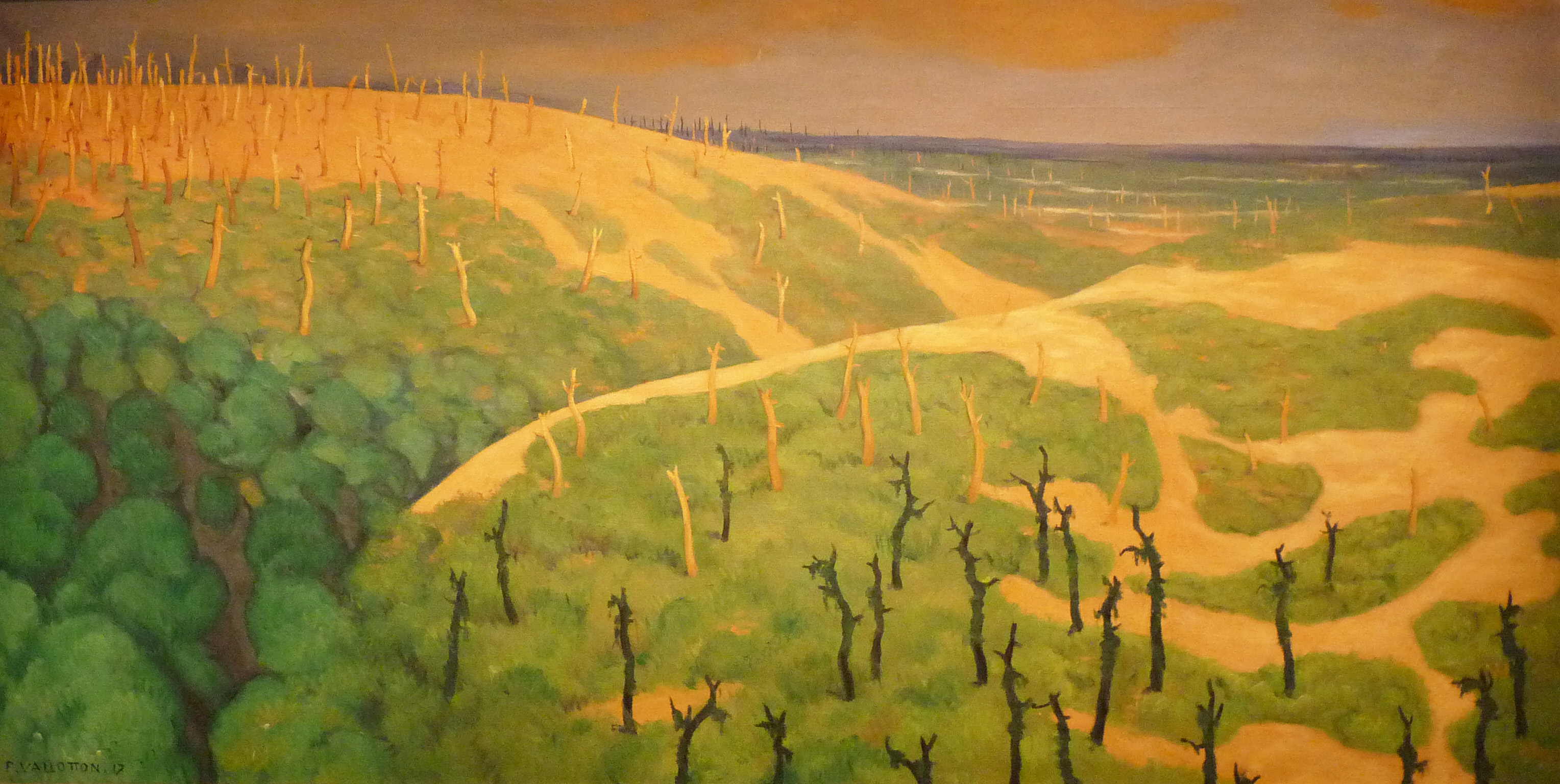 Plateau de Bolante, Argonne, Meuse, 1917